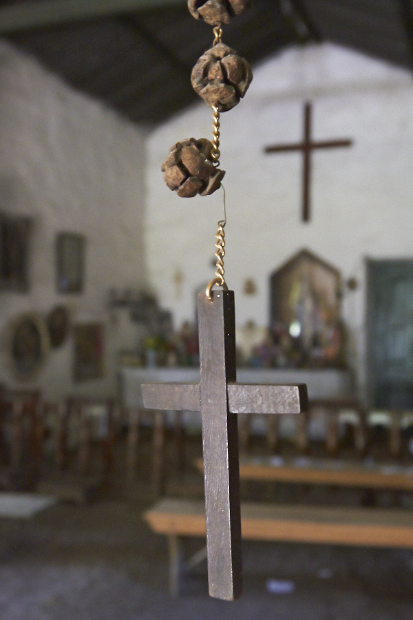 Crucifijo "casero", fabricado en madera, alambre y piñas de pino. Al fondo, altar de la Capilla.